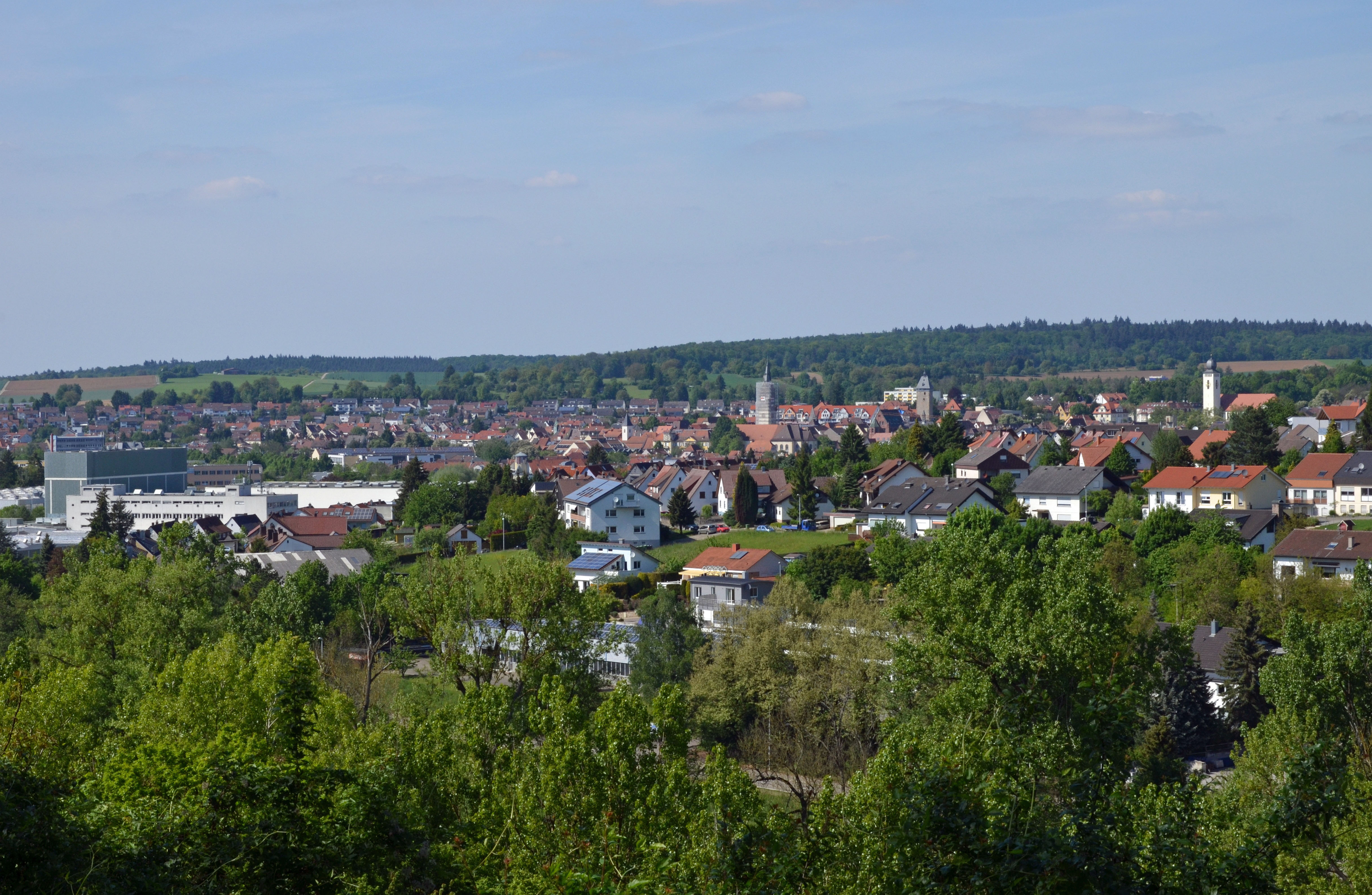 Blick auf Bretten vom Aussichtspunkt im Burgwäldle.